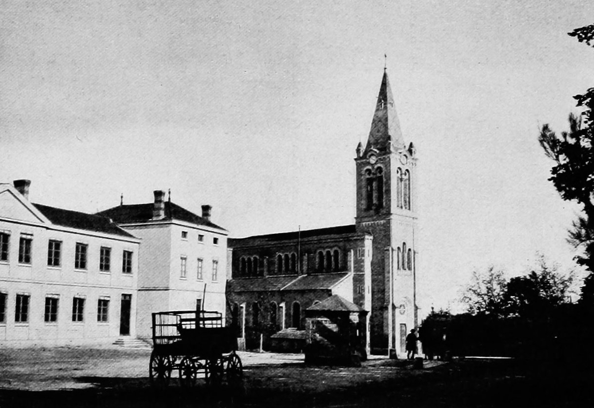 Dictionnaire illustré des communes du département du Rhône. Tome 2 / par MM. E. de Rolland et D. Clouzet.